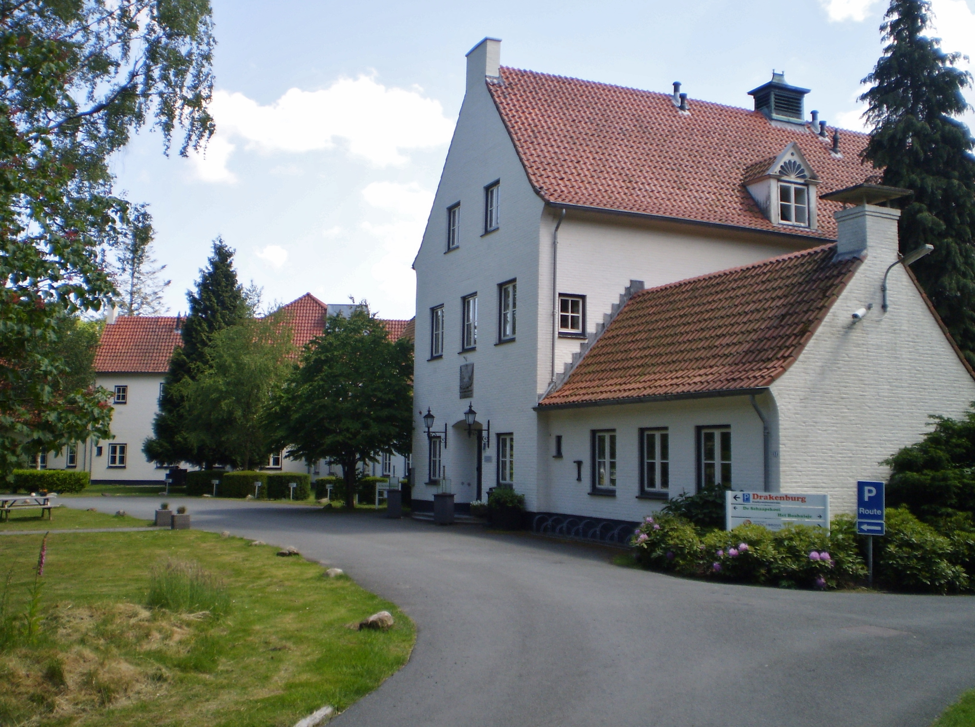 Baarn, vergadercentrum Drakenburg